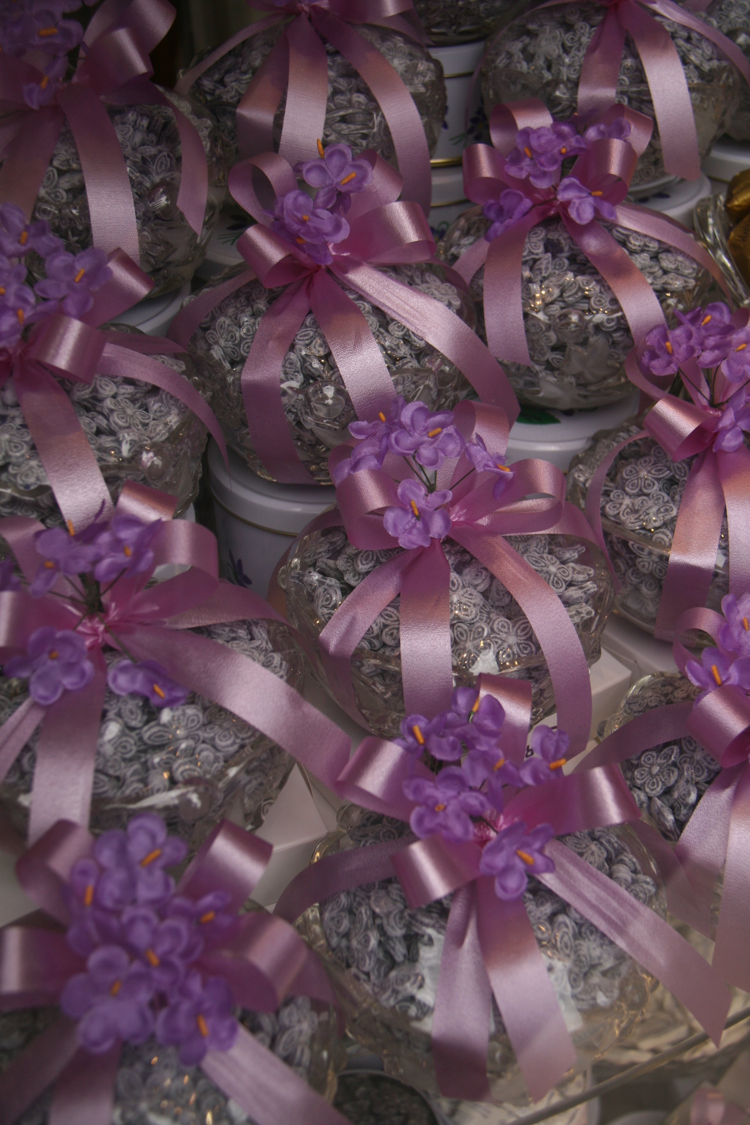 Caramelos - Violetas - Madrid